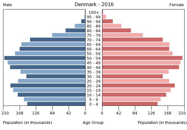 A population pyramid illustrates the age and sex structure of a country's population and may provide insights about political and social stability, as well as economic development. The population is distributed along the horizontal axis, with males shown on the left and females on the right. The male and female populations are broken down into 5-year age groups represented as horizontal bars along the vertical axis, with the youngest age groups at the bottom and the oldest at the top. The shape of the population pyramid gradually evolves over time based on fertility, mortality, and international migration trends.